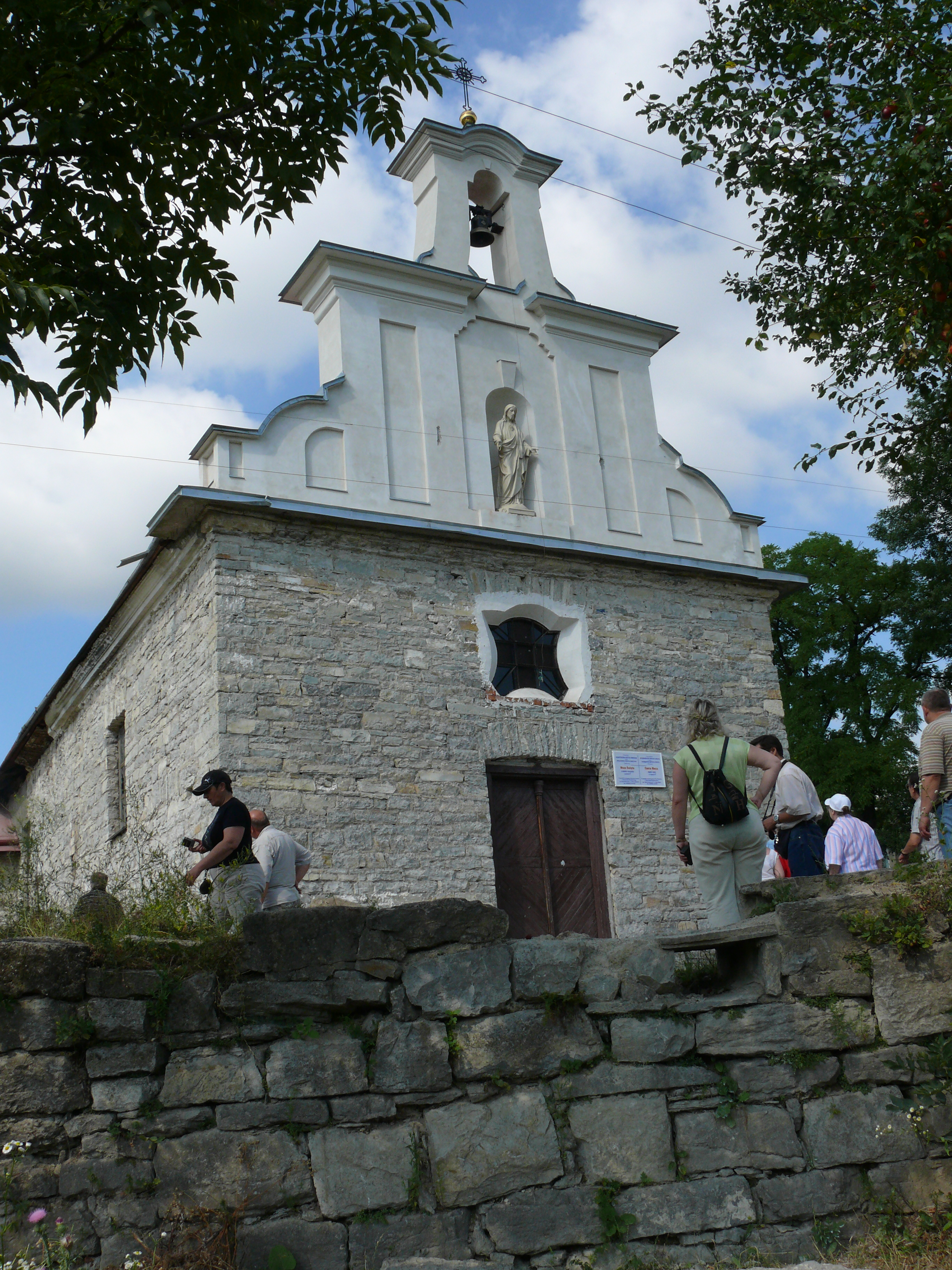 Костьол Воздвиження Чесного Хреста, село Зіньківці, у центральній частині села